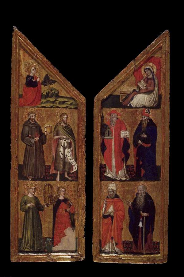 Trittico